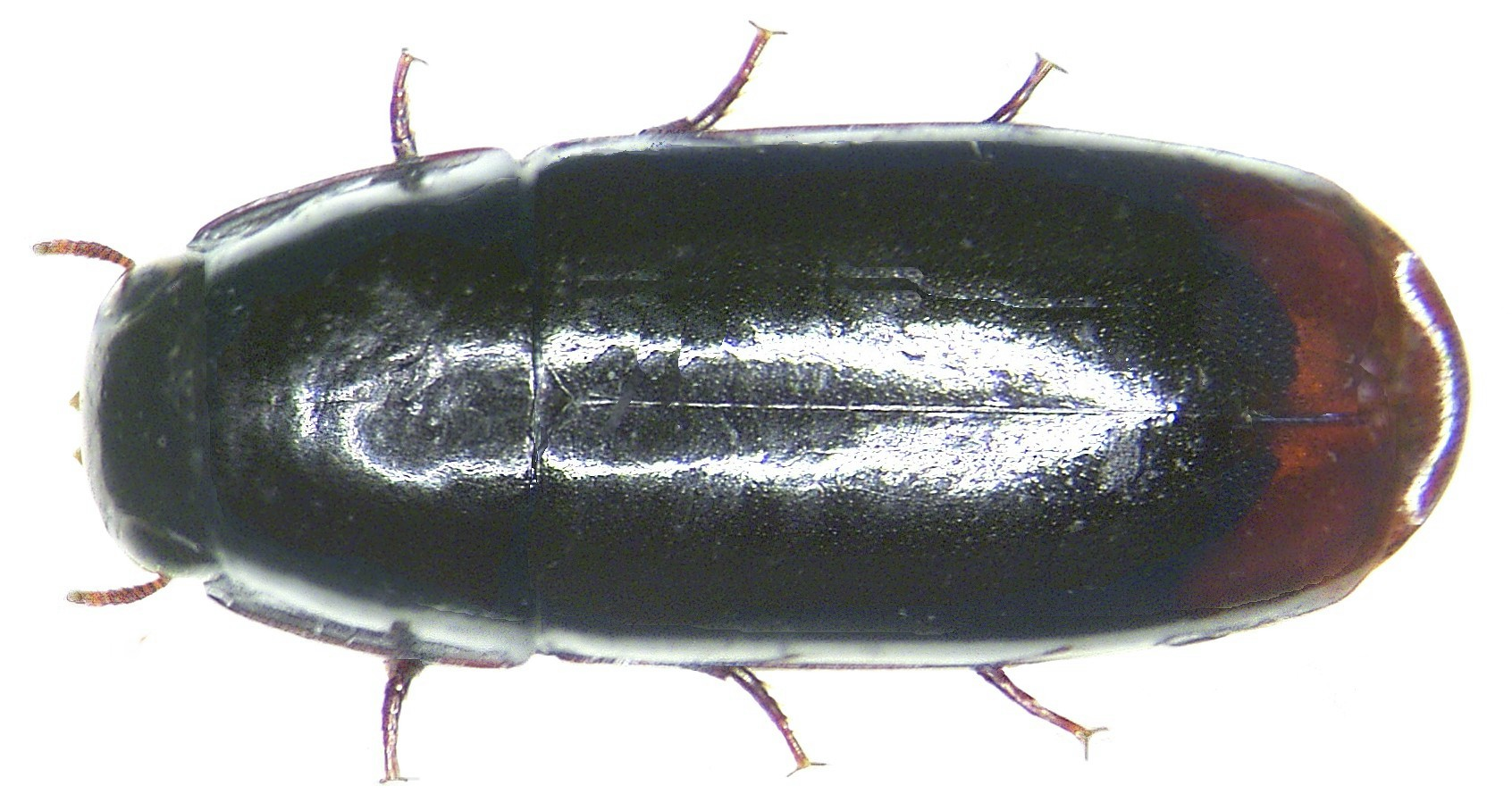 Familie: Carabidae Grösse: 6 mm Fundort: Australien, Sidney leg. 1997; det. M.Baehr Foto: U.Schmidt, 2007